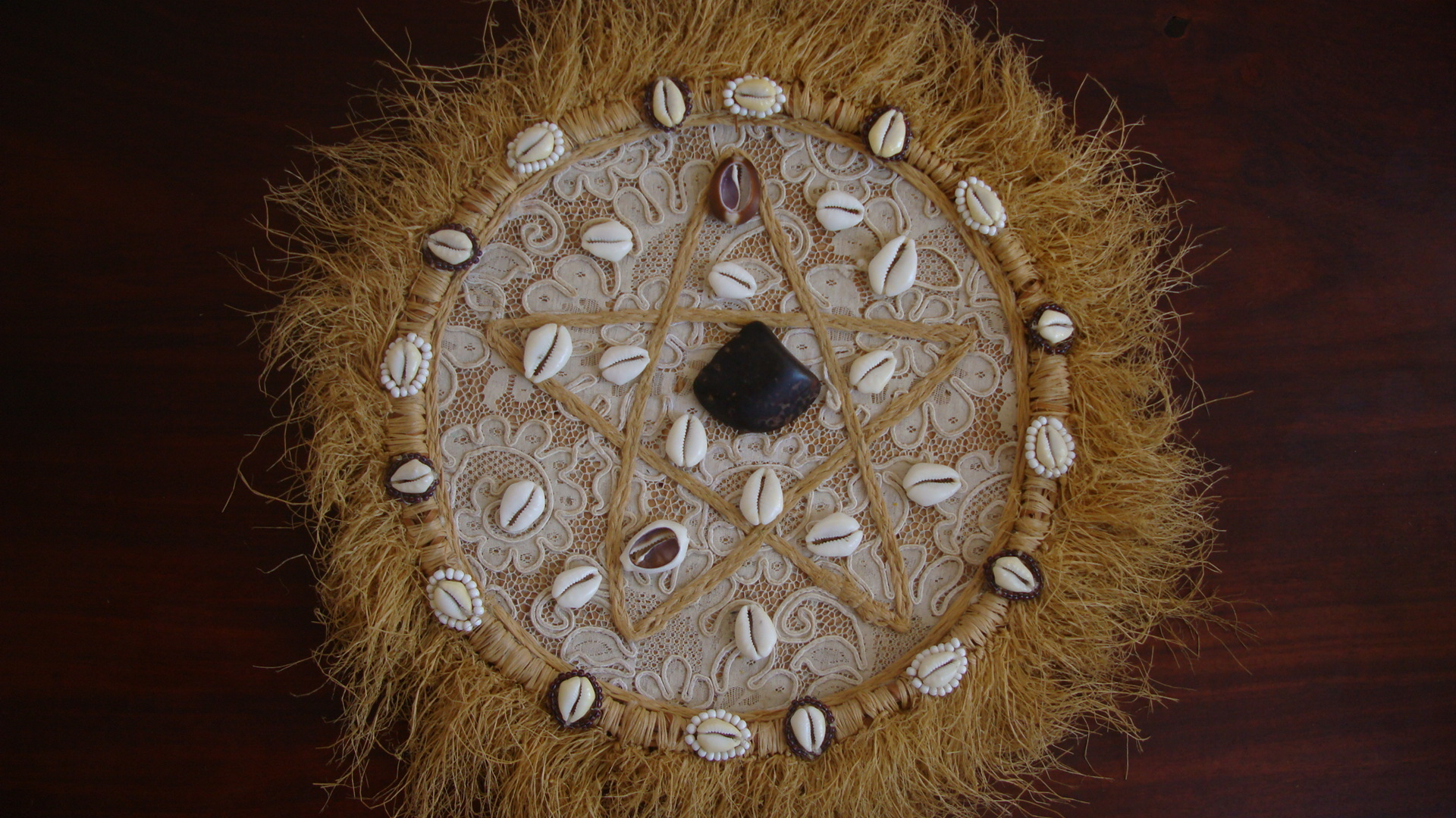 Odu Iká Merindilogun, Salvador, Bahia, Brasil.